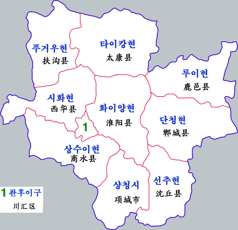 저우커우시 현급구역도